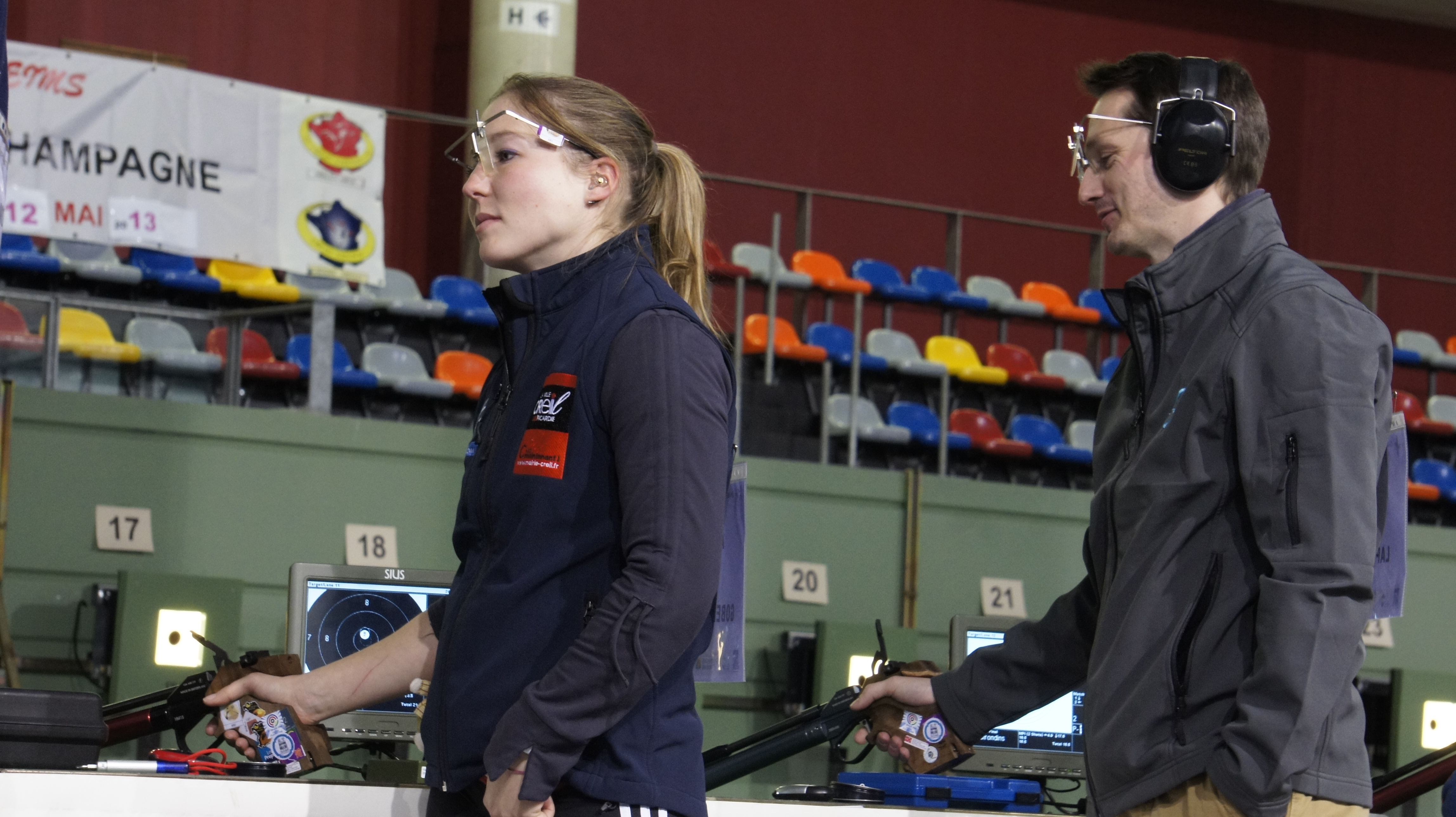 Céline Goberville_et Walter Lapeyre opposés lors du championnat de France 2013 par équipe .